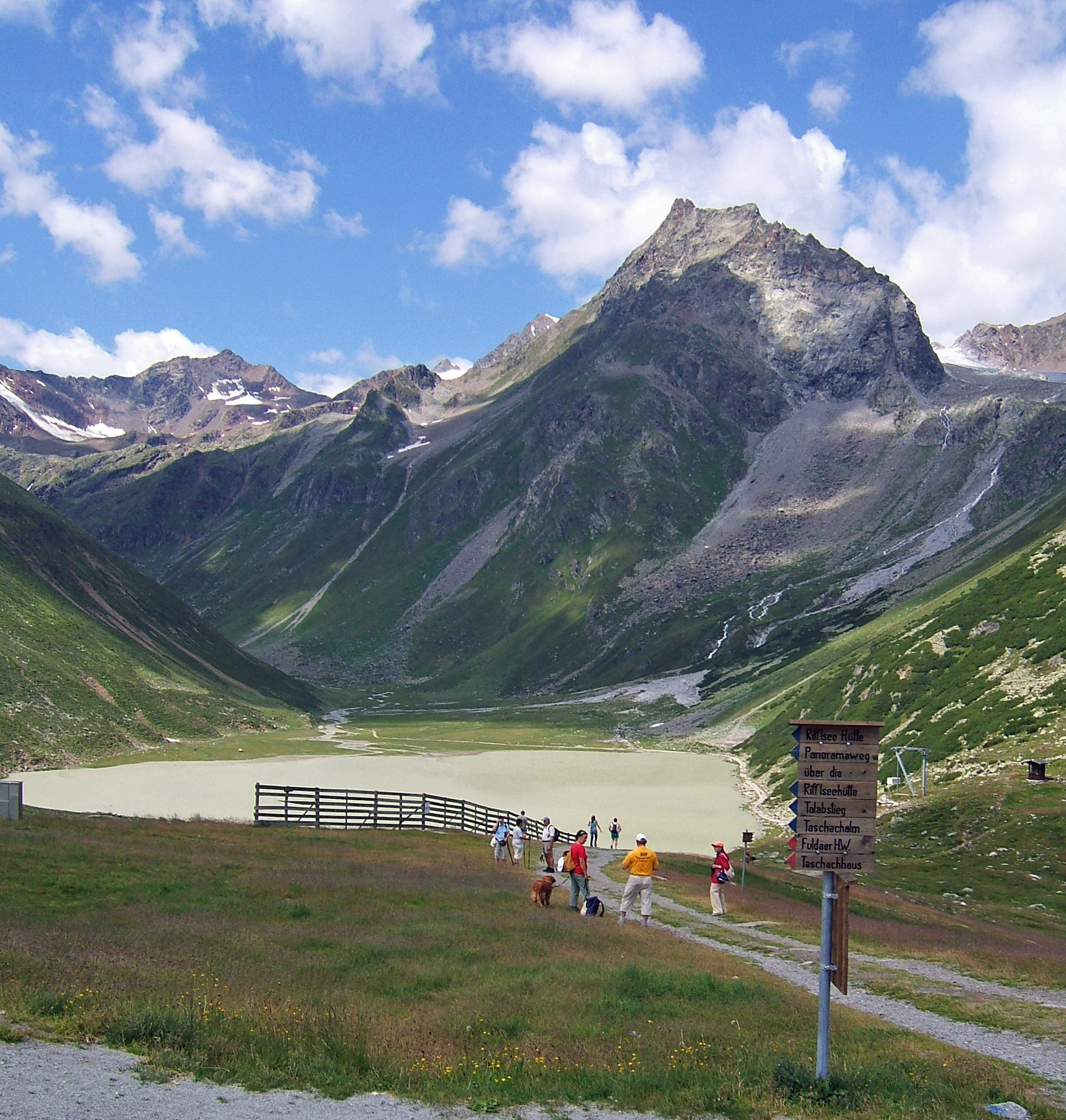 Seekogel and Rifflsee (Pitztal)